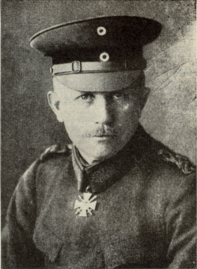 Gustav Adolf Joachim Rüdiger Graf von der Goltz Major-General